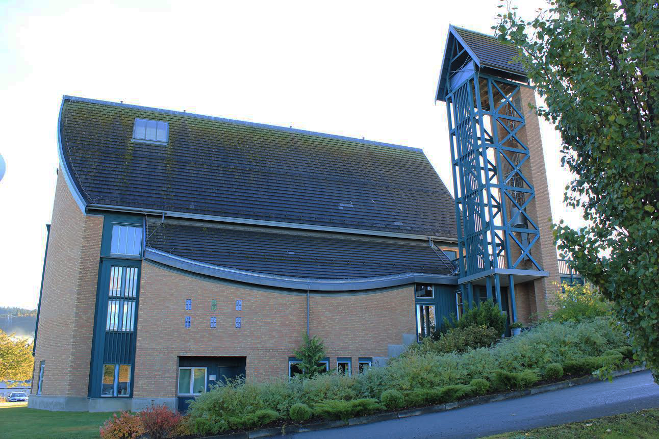 Hoeggen kirke, Trondheim. Sett fra nord